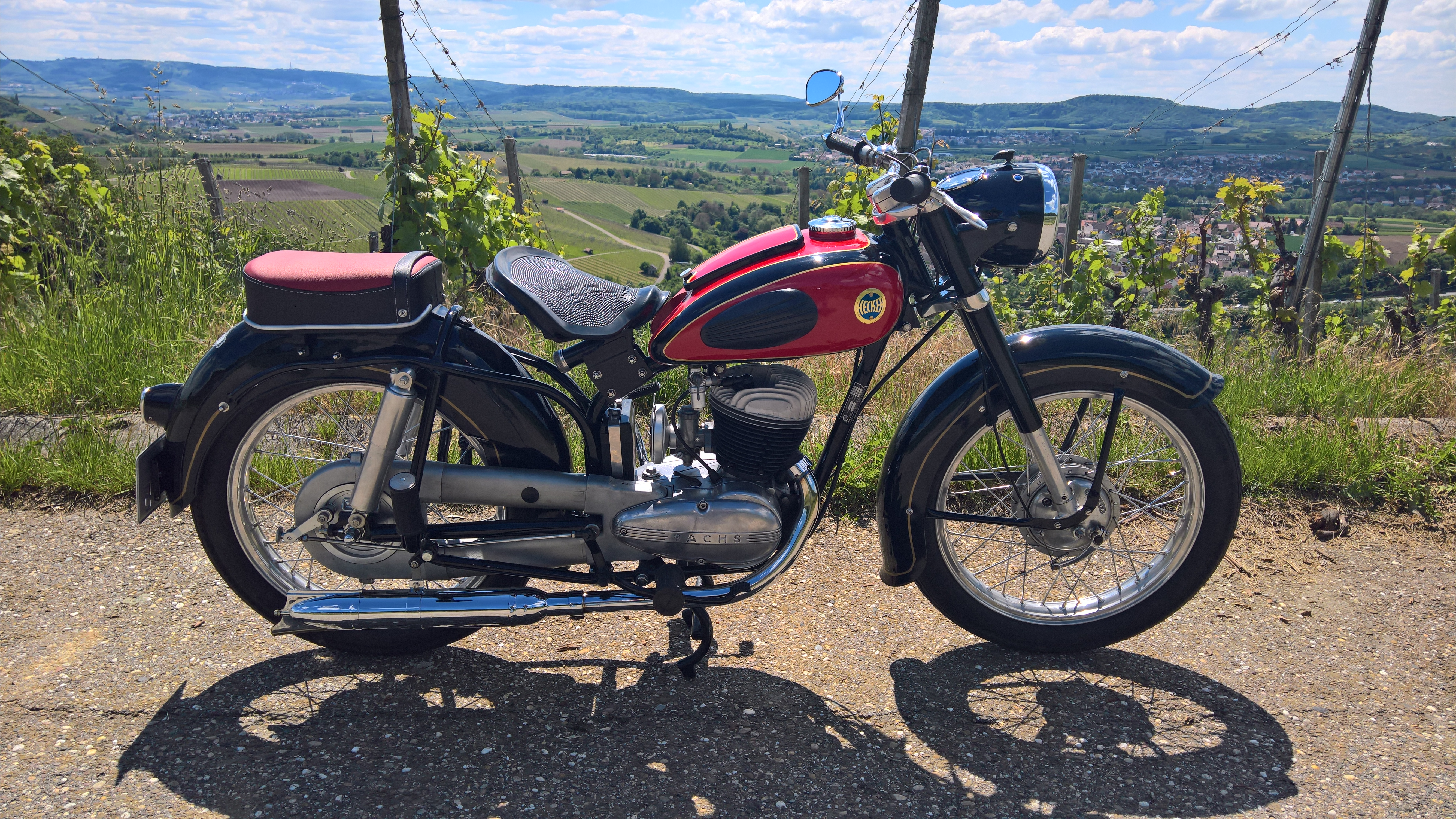 Hecker K175 S von 1954, gebaute Stückzahl ca. 10 Stück